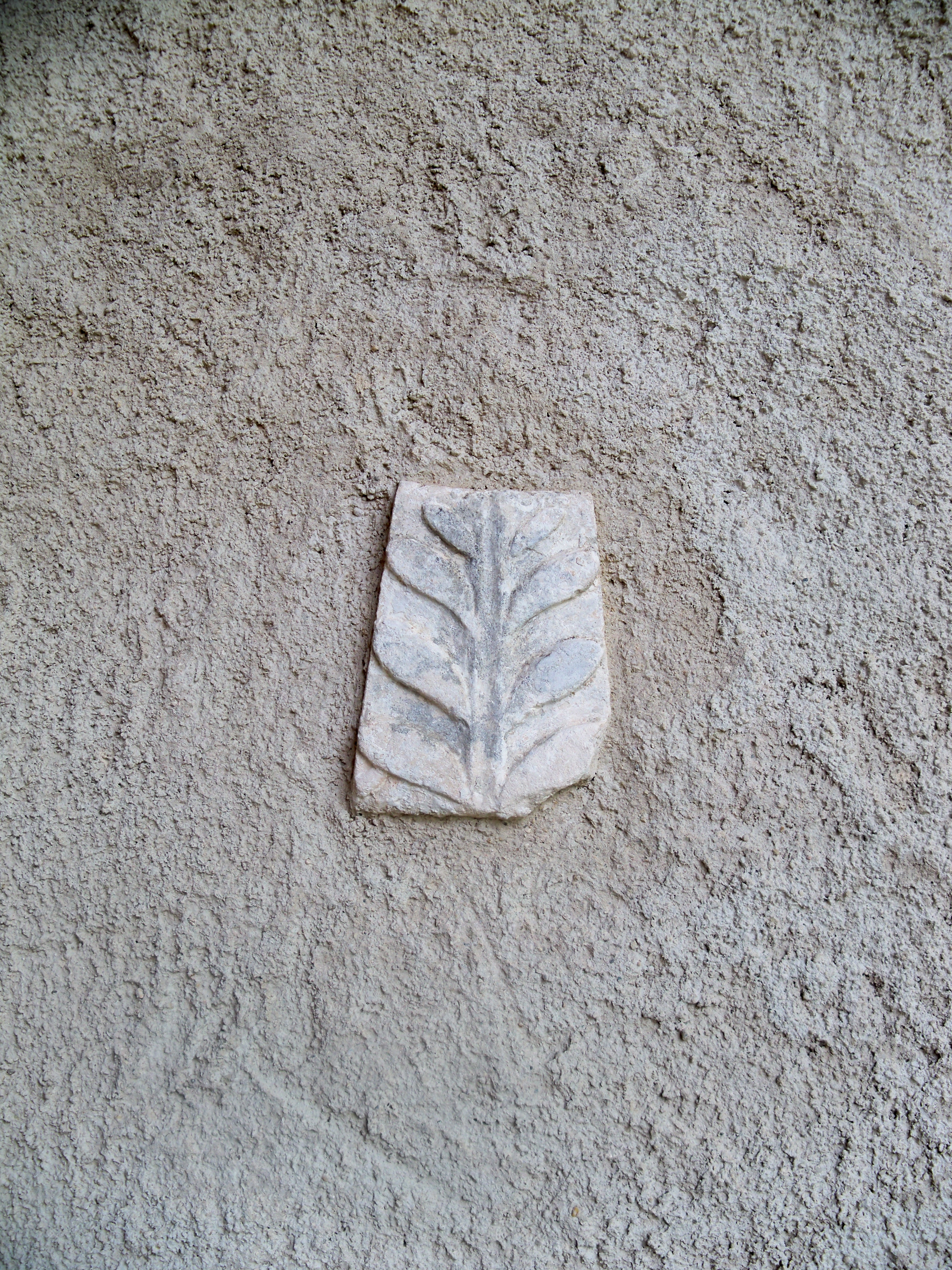 relief sur la facade de la Chapelle Notre Dame de Lamaron, Lagarde d'Apt, Vaucluse, France